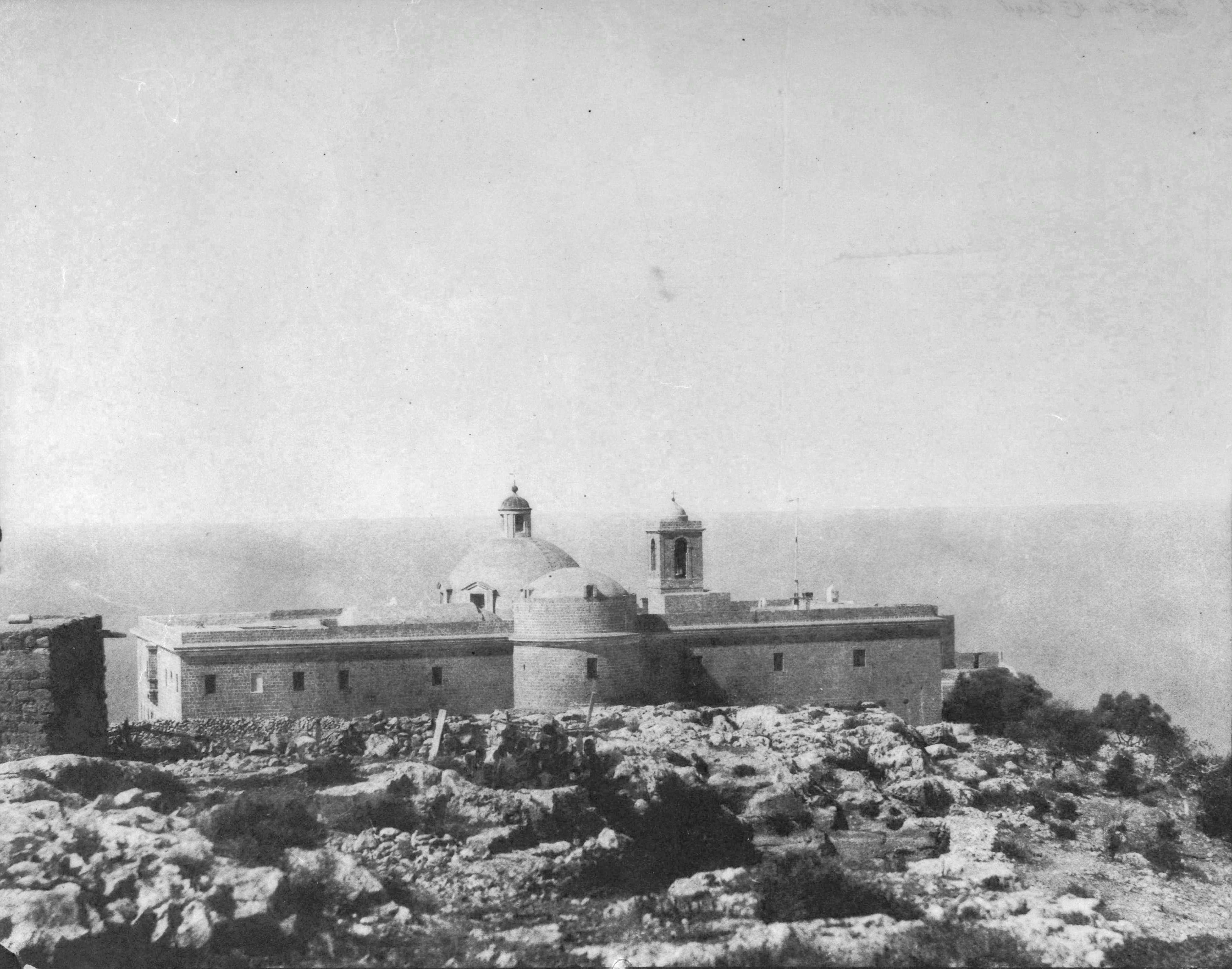 Couvent du Mont Carmel : [photographie positive] / [Louis Vignes]